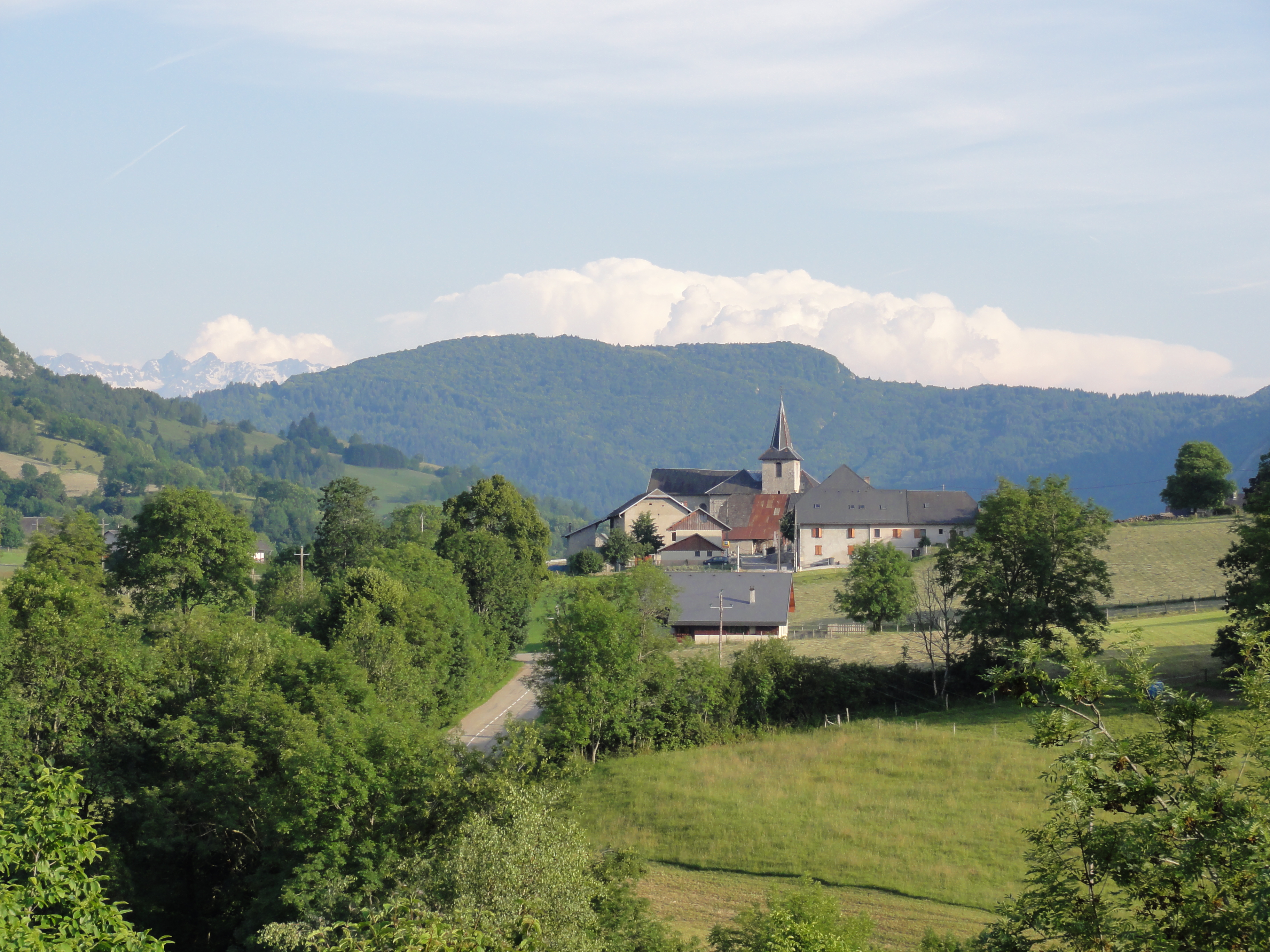 Vue du Nord du chef-lieu de Puygros